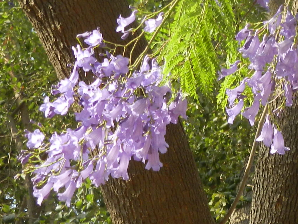 नीलमोहर